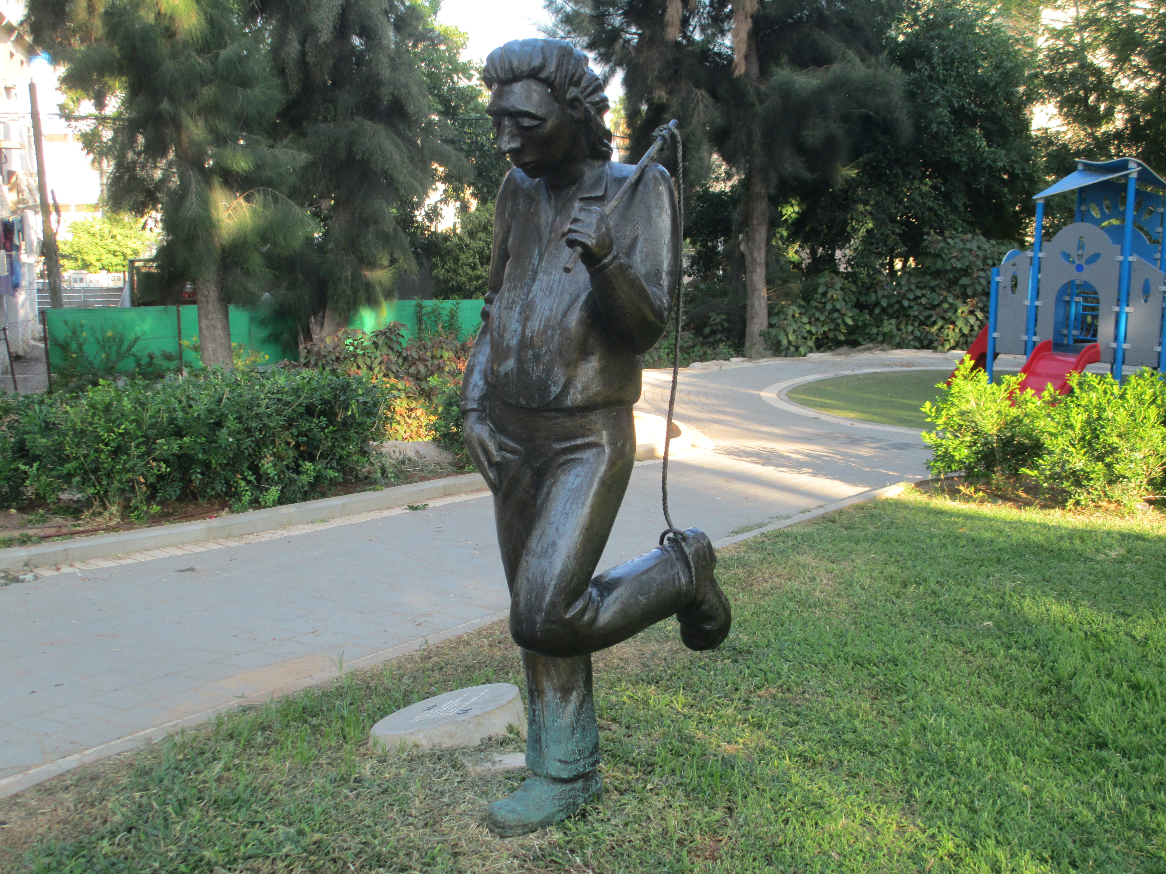 גן סיפור עלילות פרדיננד פדהצור בקיצור בחולון. בצו המלך פרדיננד נאלצו האזרחים לדדות על רגל אחת.